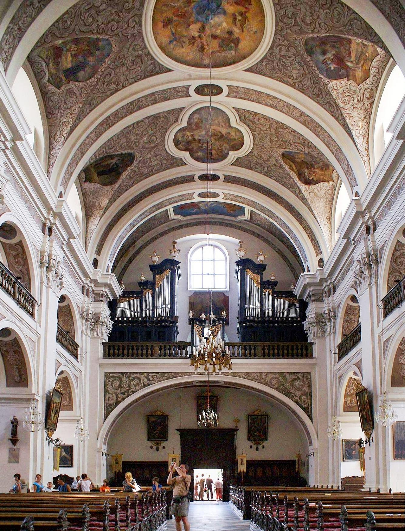 Ottmachau, St. Nikolaus und Franz Xaver